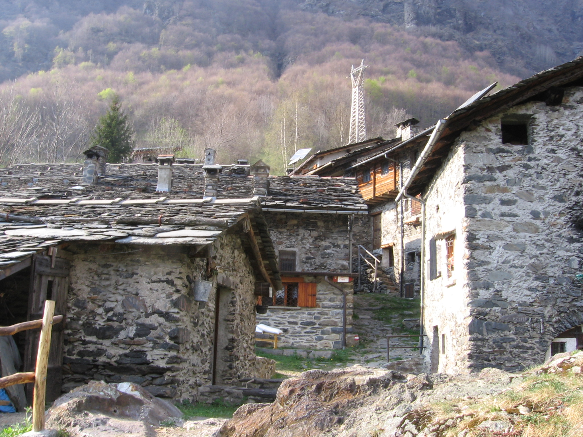 Loc. Maslana, Valbondione, Bergamo, Italia